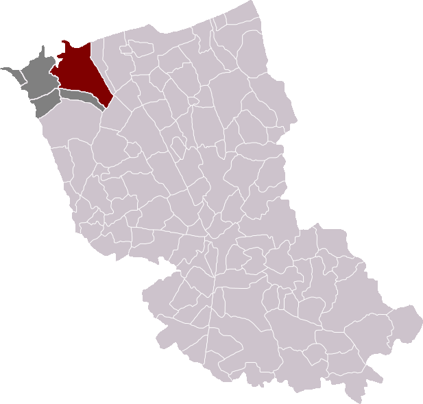 Locatie gemeente Loon in arrondissement Duinkerke. Zelfgemaakt. Location of Loon-Plage municipality in the arrondissement of Dunkirk. Self made. Localisation de la commune de Loon-Plage dans l'arrondissement de Dunkerque. Fait moi-même.